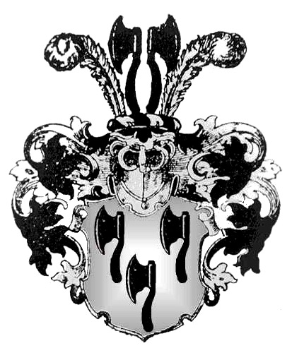 Wappen der Familie von Bardeleben (Mindener Zweig aus der Nähe von Minden, Nordrhein-Westfalen.)